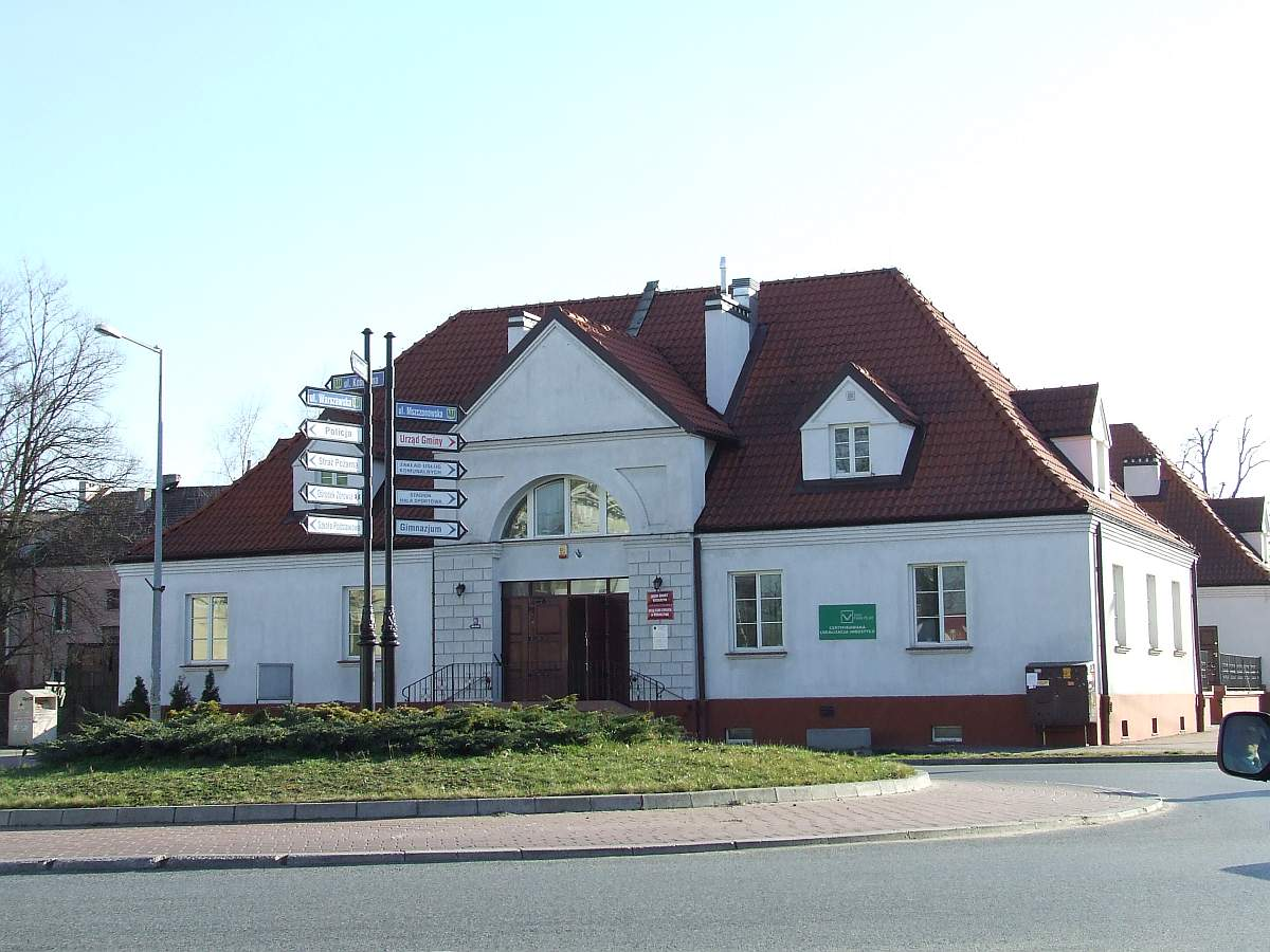 Urząd Rady Gminy, także Dom Kultury od strony Rynku 11.1959.